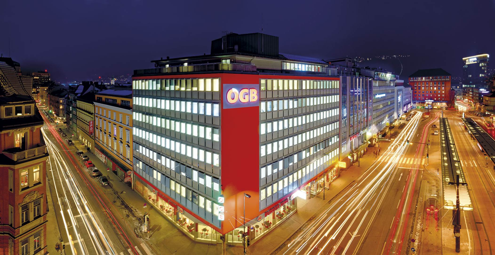 In diesem Gebäude mit der Adresse Südtiroler Platz 14-16, 6010 Innsbruck befindet sich der ÖGB Tirol.